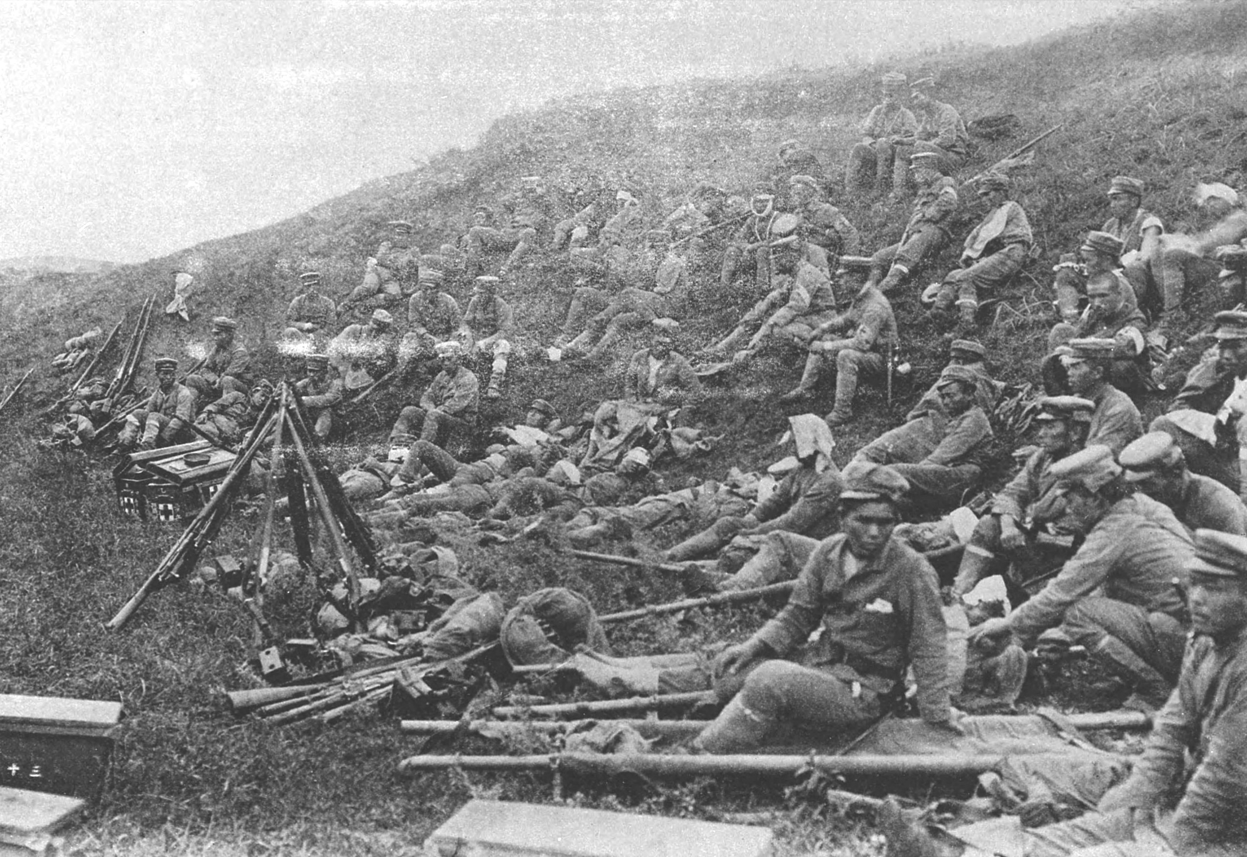 日露戦争において休憩中の歩兵第21連隊